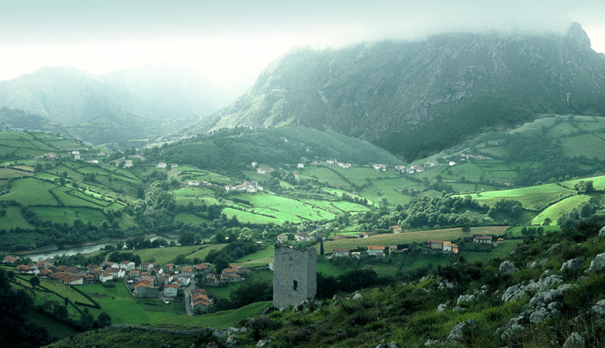 Torreón de Peñerudes. Al fondo se observa el monte Monsacro